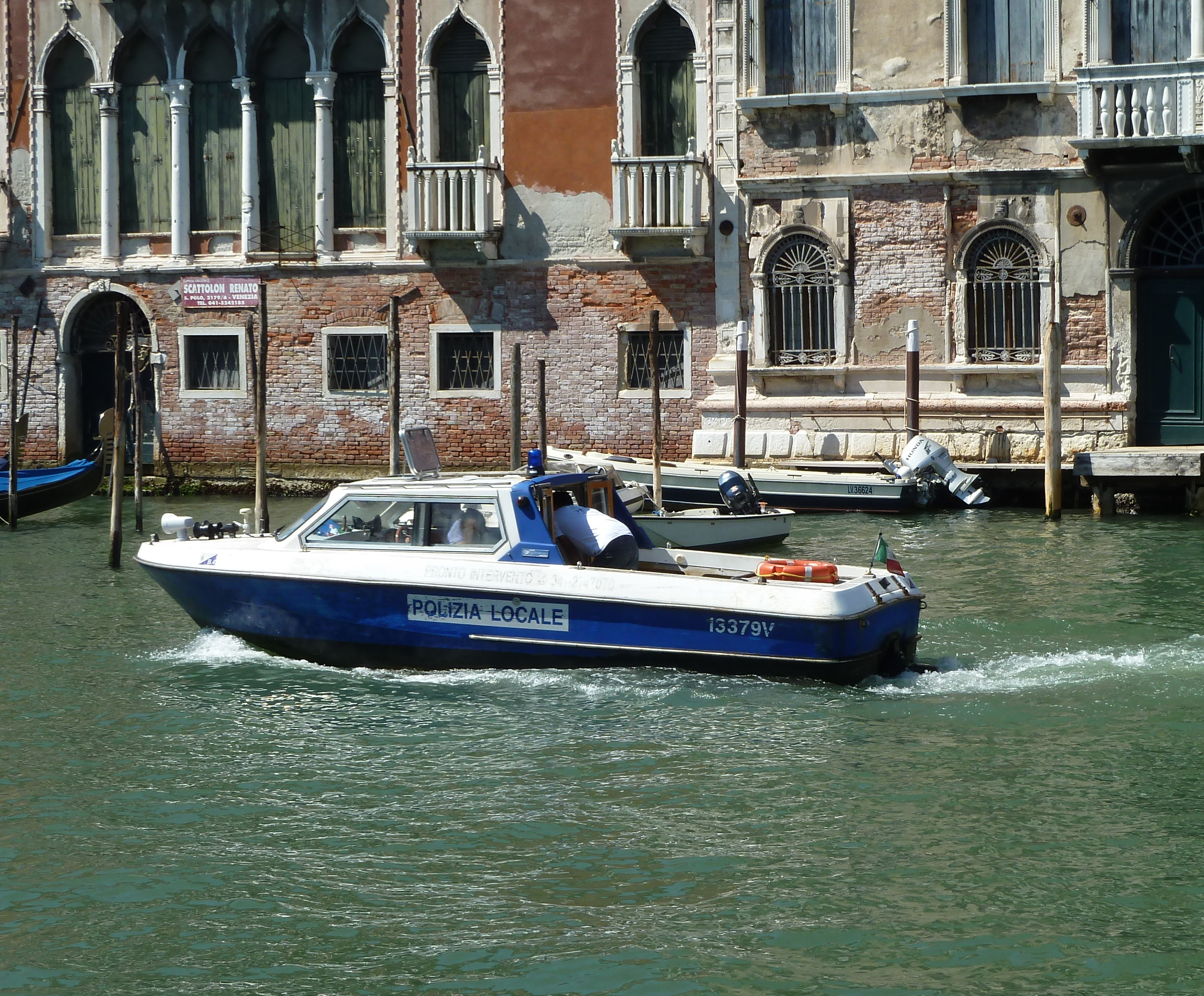 police fluviale